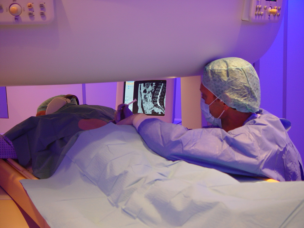 Eingriff am offenen Magnetresonanztomographen in der Klinik für diagnostische Radiologie und Nuklearmedizin am Universitätsklinikum Magdeburg